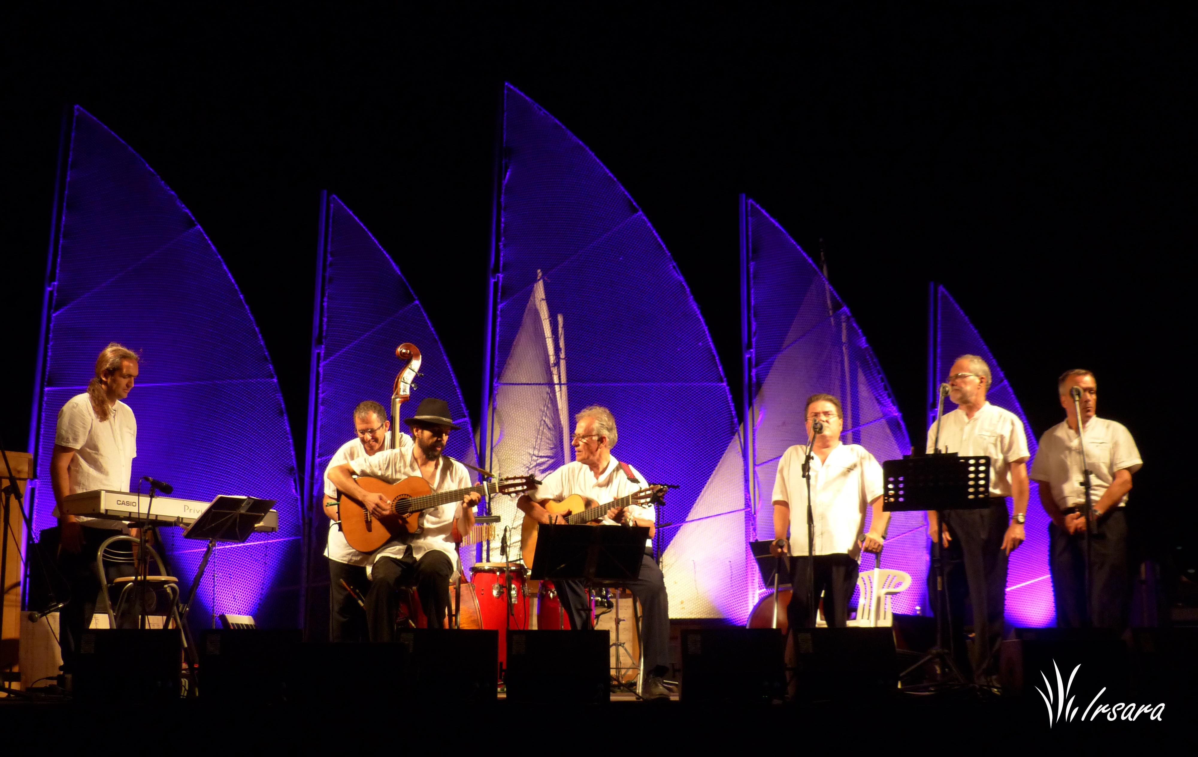 Fotografia a la XIIIa edició de la Trobada d'Havaneres de la Costa Daurada